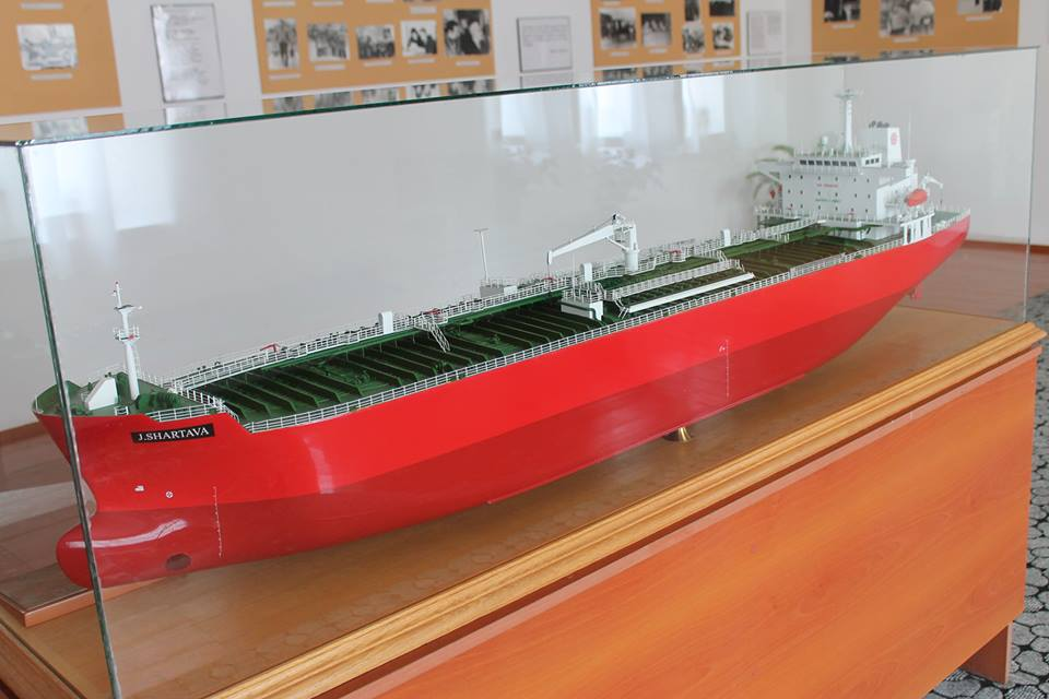 ტანკერ "ჟ. შარტავას" მაკეტი